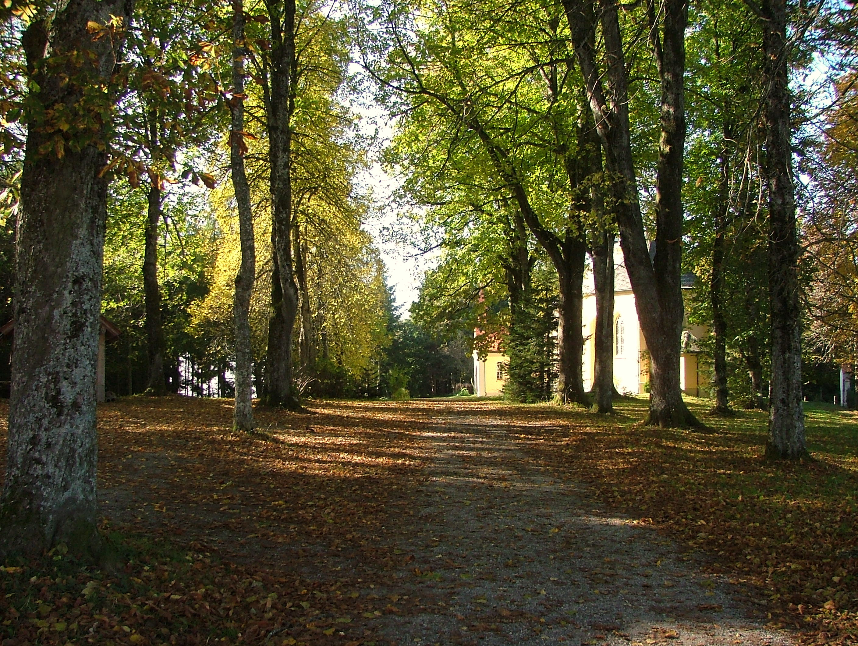 Gschnaidt